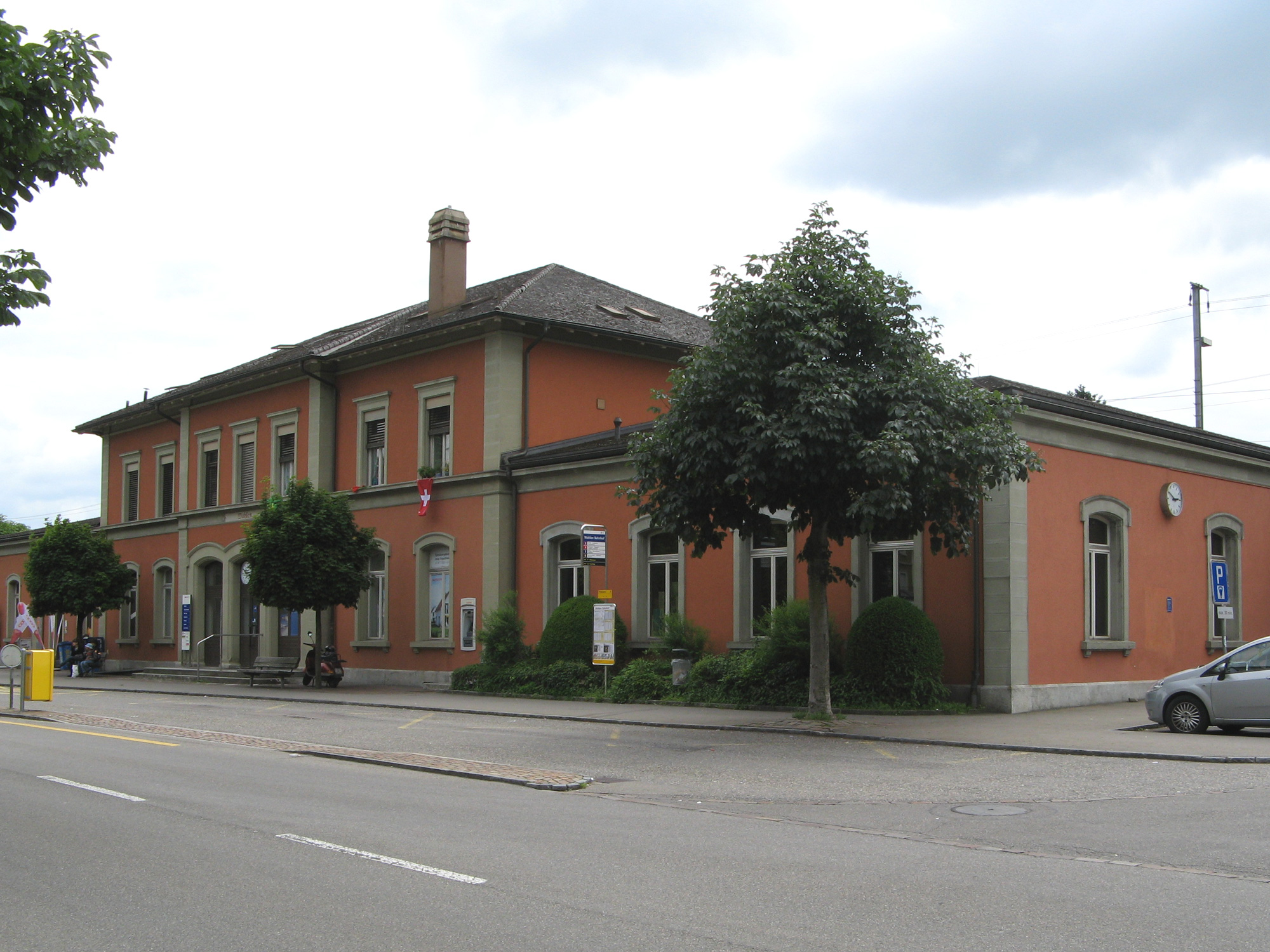 Bahnhof Wohlen, Vorderseite